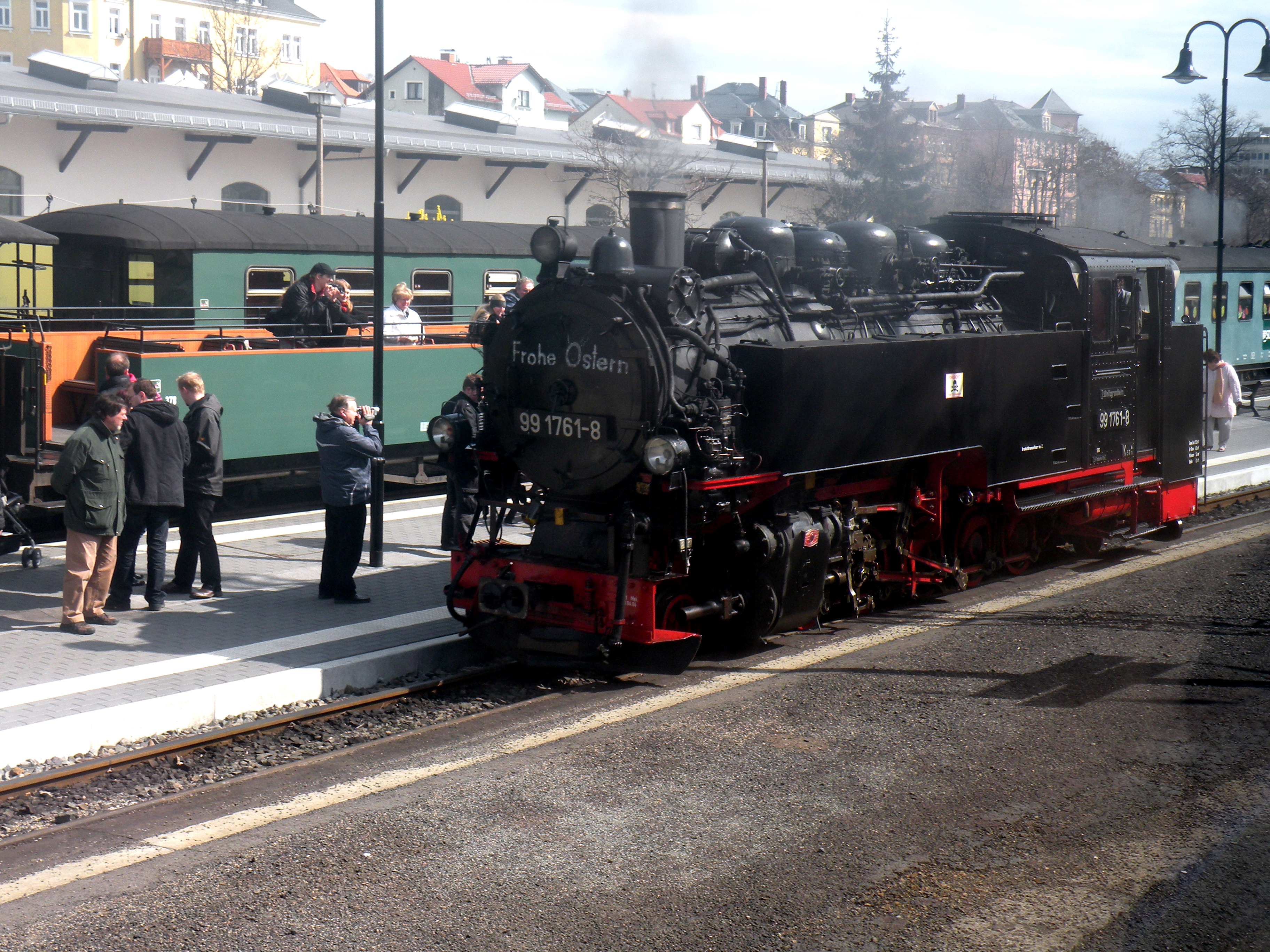 Дрезден.Паровоз пригородной ж.д..jpg